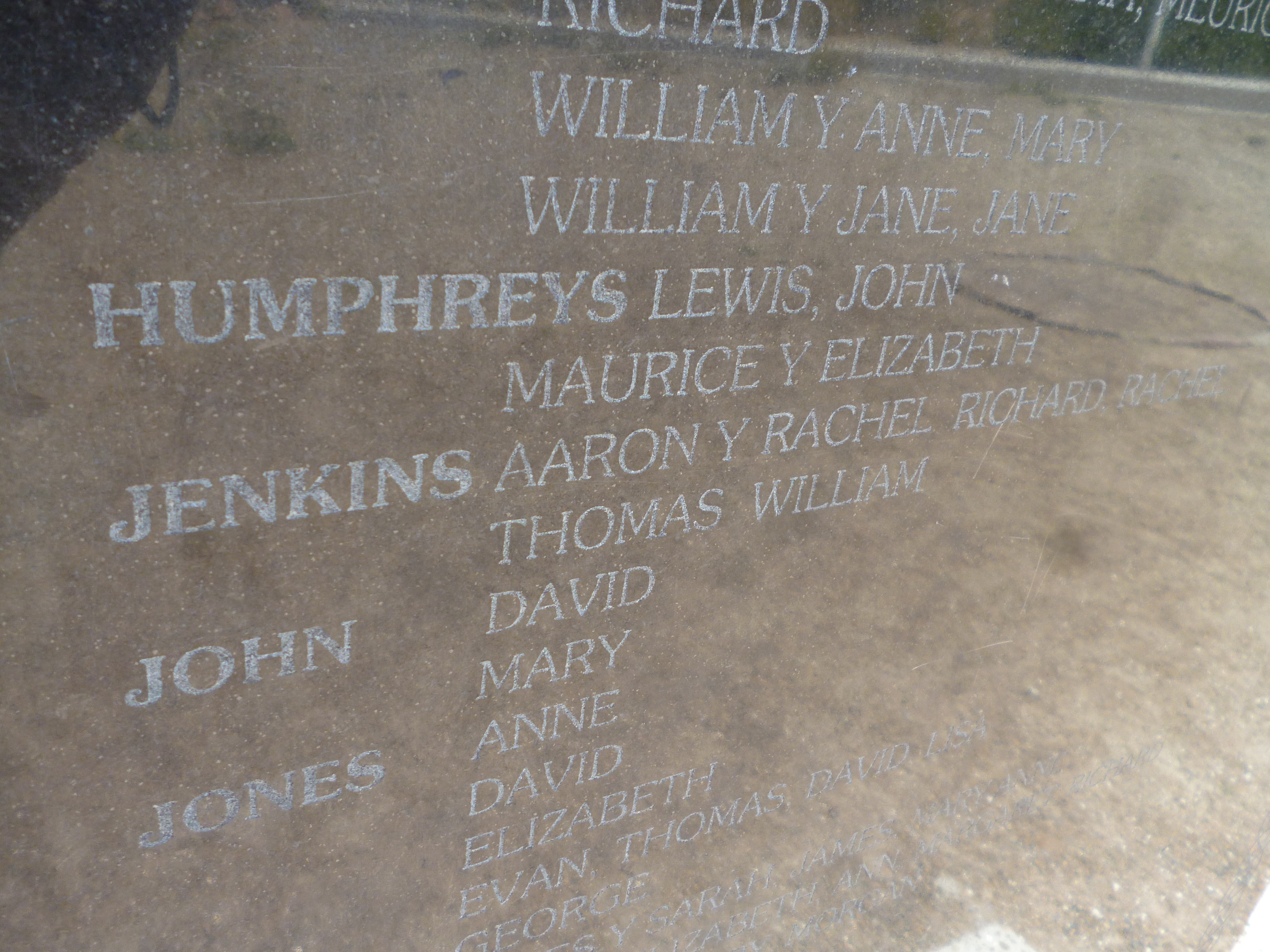 Monumento al desembarco galés, Punta Cuevas, Y Wladfa. La placa contiene los nombres de todos los colonos llegados en el Mimosa